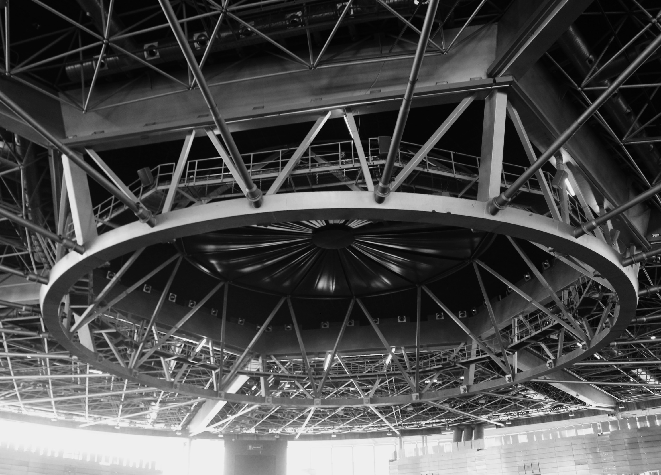 Anillo de tracción interior con cables postesados